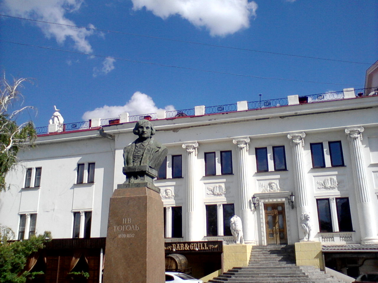 Бюст Н. В. Гоголя (Волгоград)